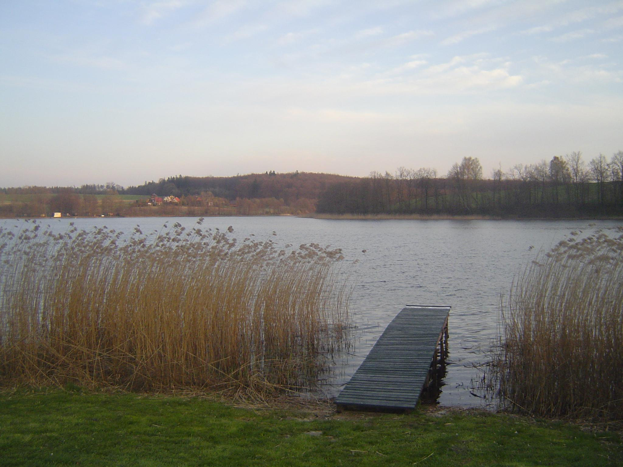 Kaszëbsczi: Jezoro Lewinkò 2